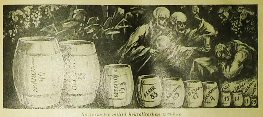 Illusztráció a Társadalmi lexikonhoz